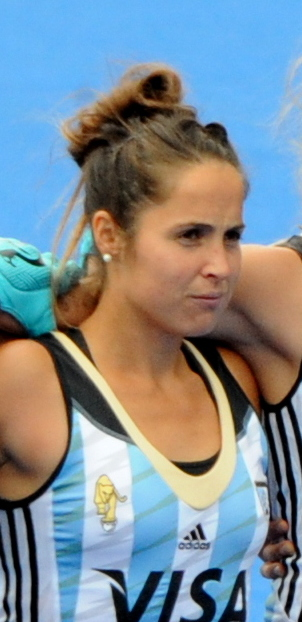 GB v Argentina 2016 CT